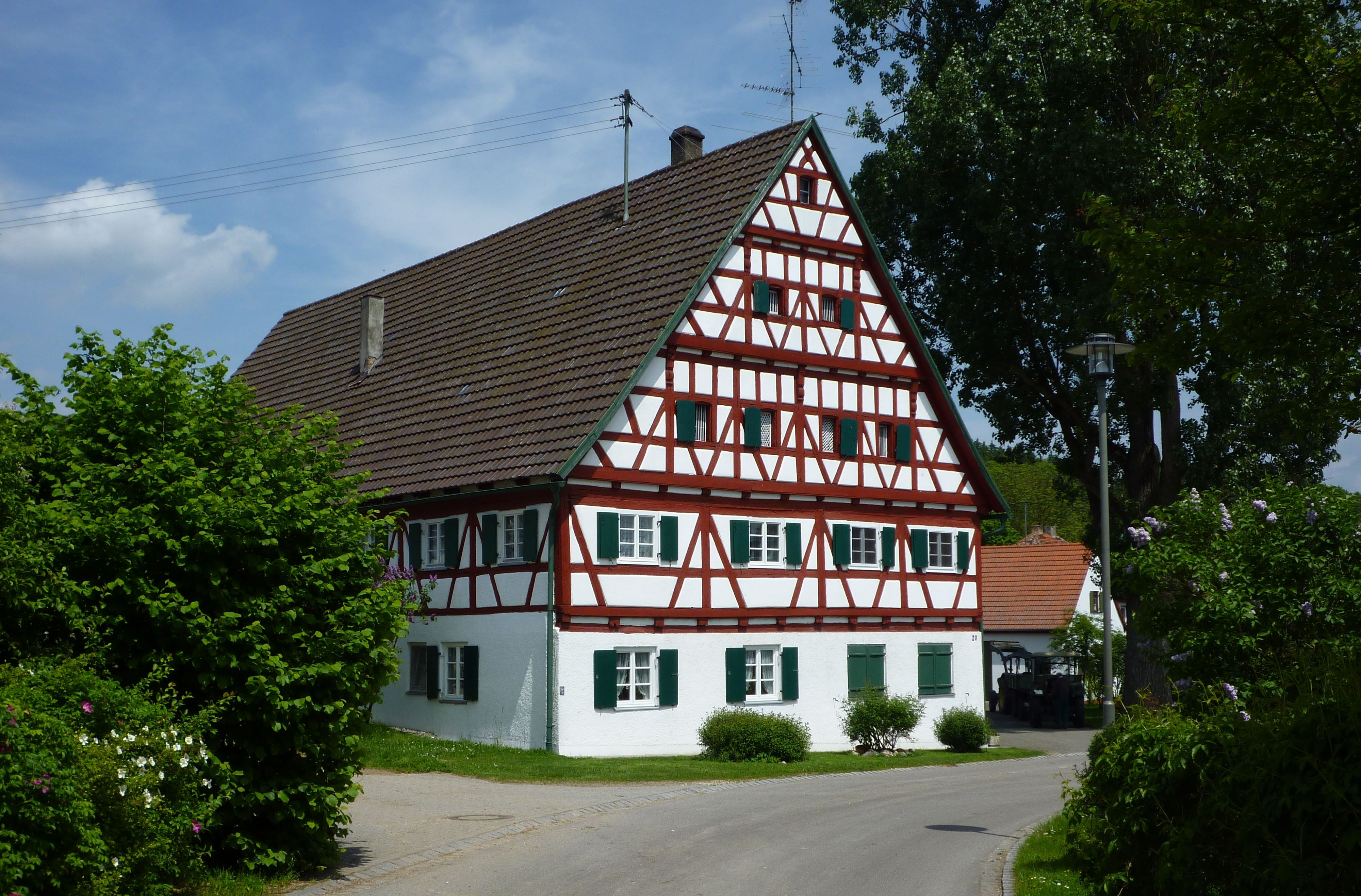 Bibertal - Fachwerk-Bauernhaus, Daiblerstraße 20 in Ettlishofen